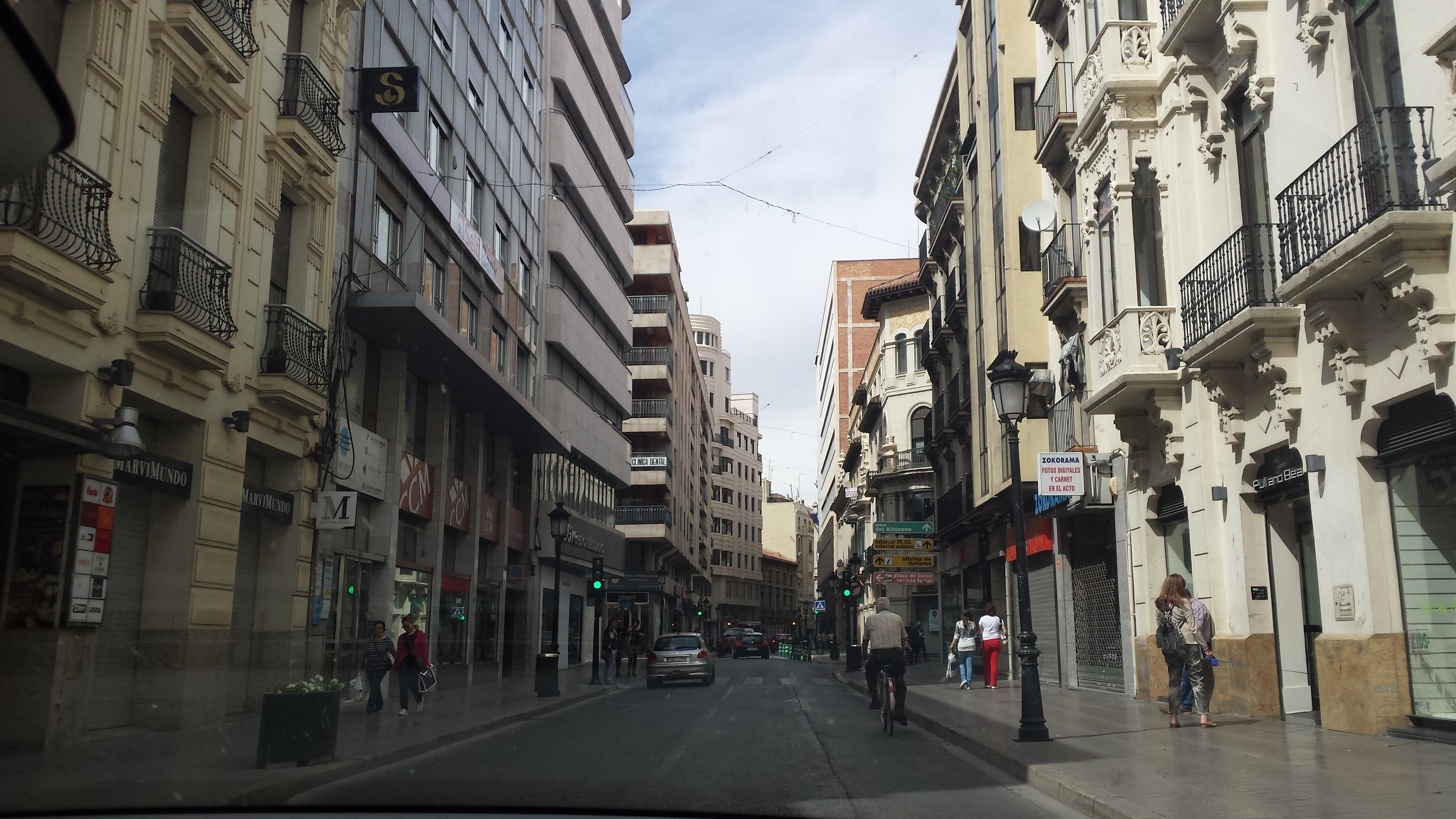 Calle Ancha. Albacete